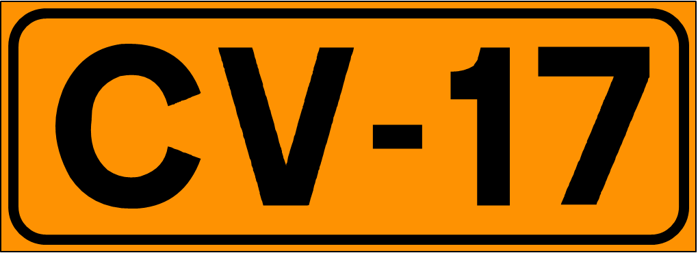 Inidcador de la Carretera de la Comunidad Valenciana CV-17